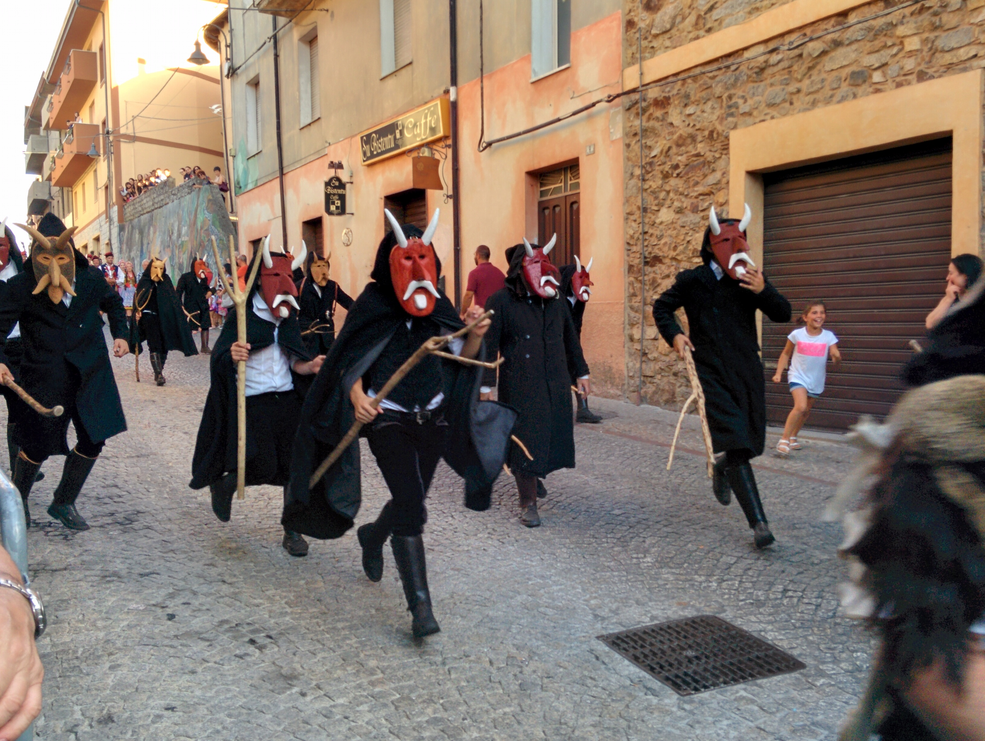 Maschere di Su Bundu durante la sfilata